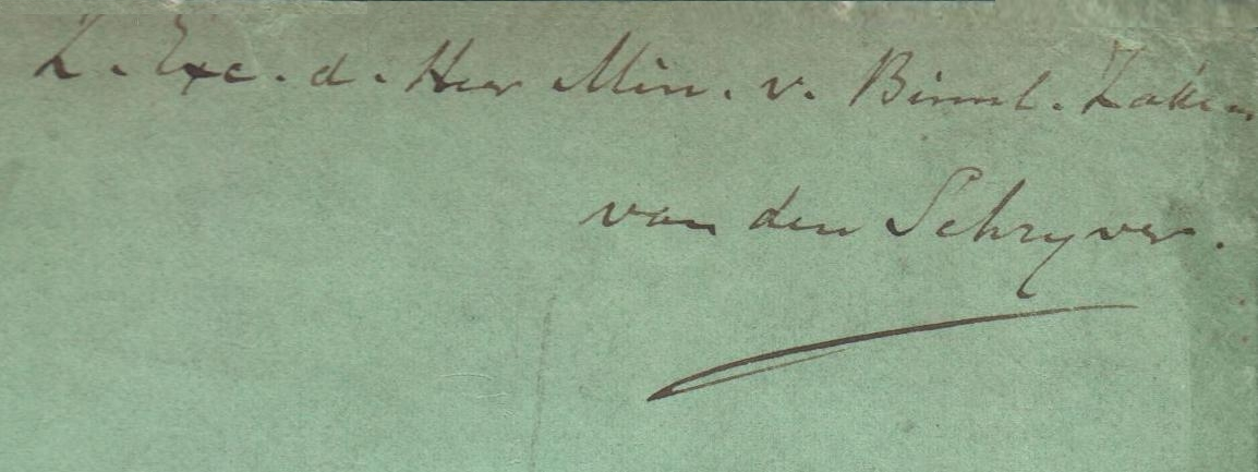 Het handschrift van R. Westerhoff. Opdracht op diens boekje 'Verhandeling over de kol- of heksekringen' (1859)